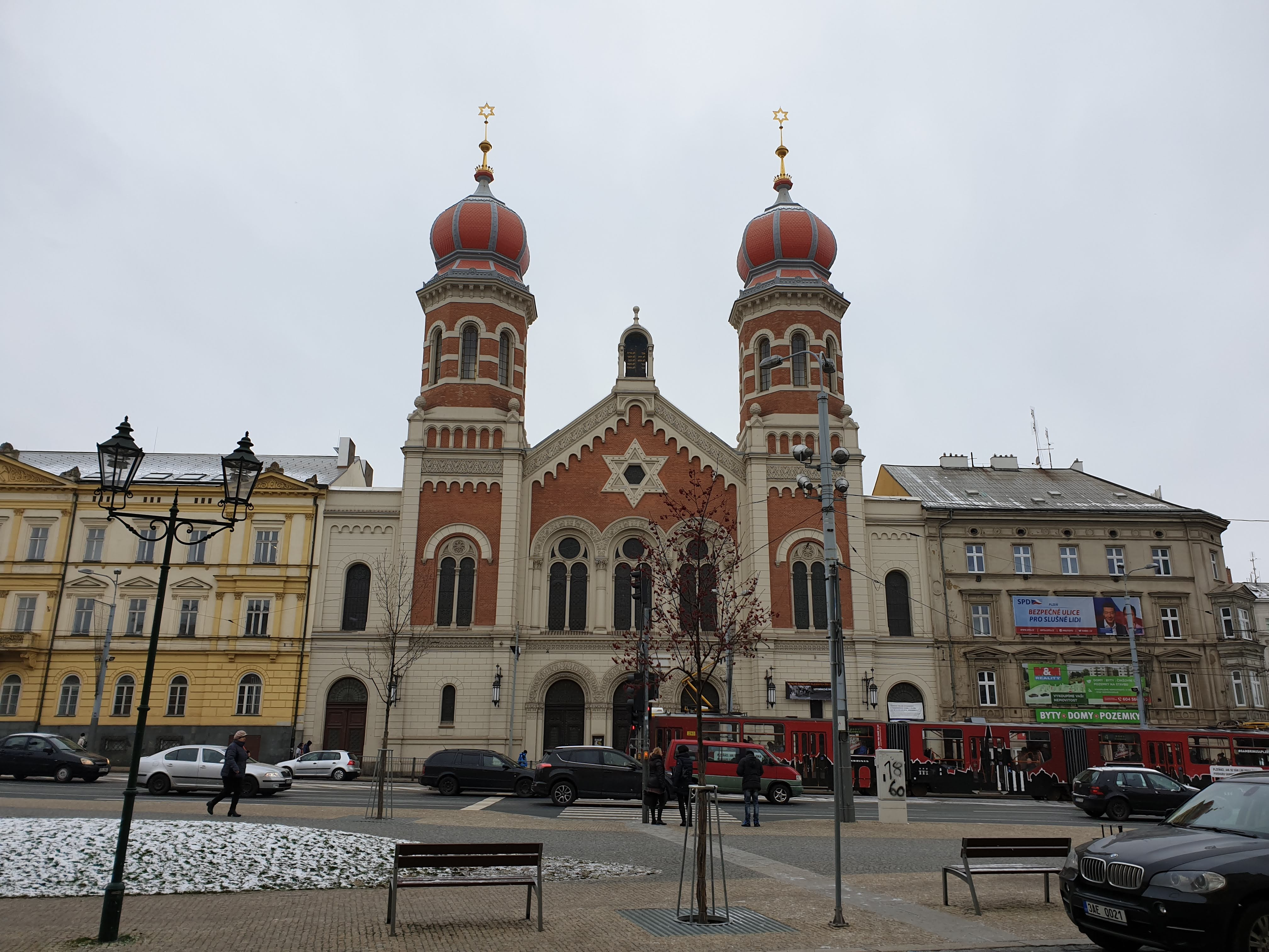 בית הכנסת הגדול של פילזן